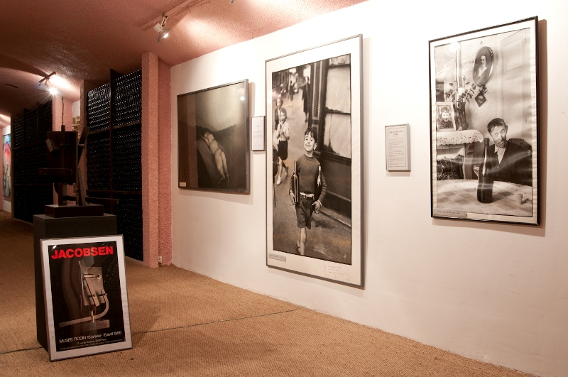 Oeuvres de Henri Cartier-Bresson et Jacobsen